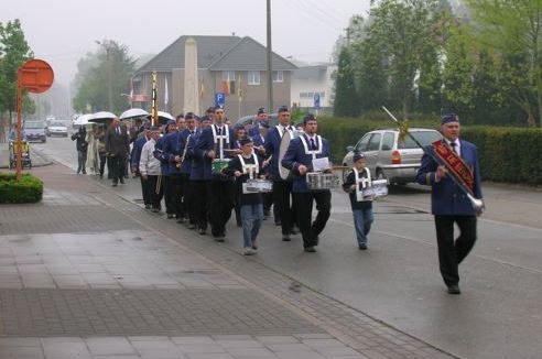 Fanfare "De Eendracht" op stap in Oostkamp.